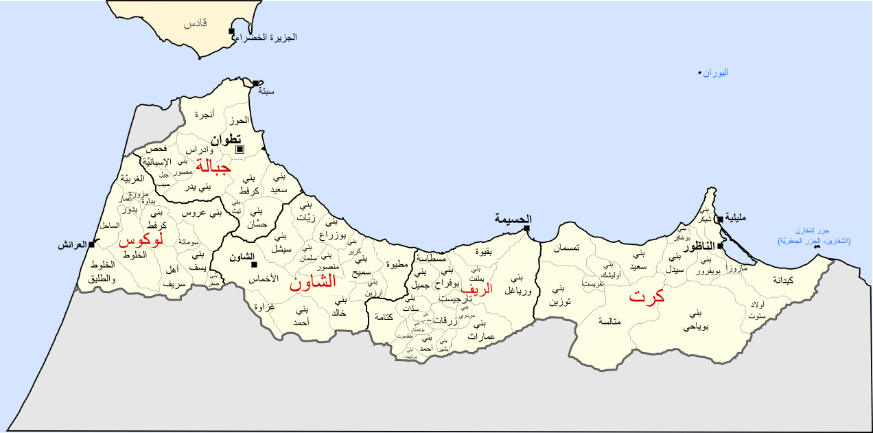 قبائل المغرب خلال فترة الحماية الإسپانيَّة.